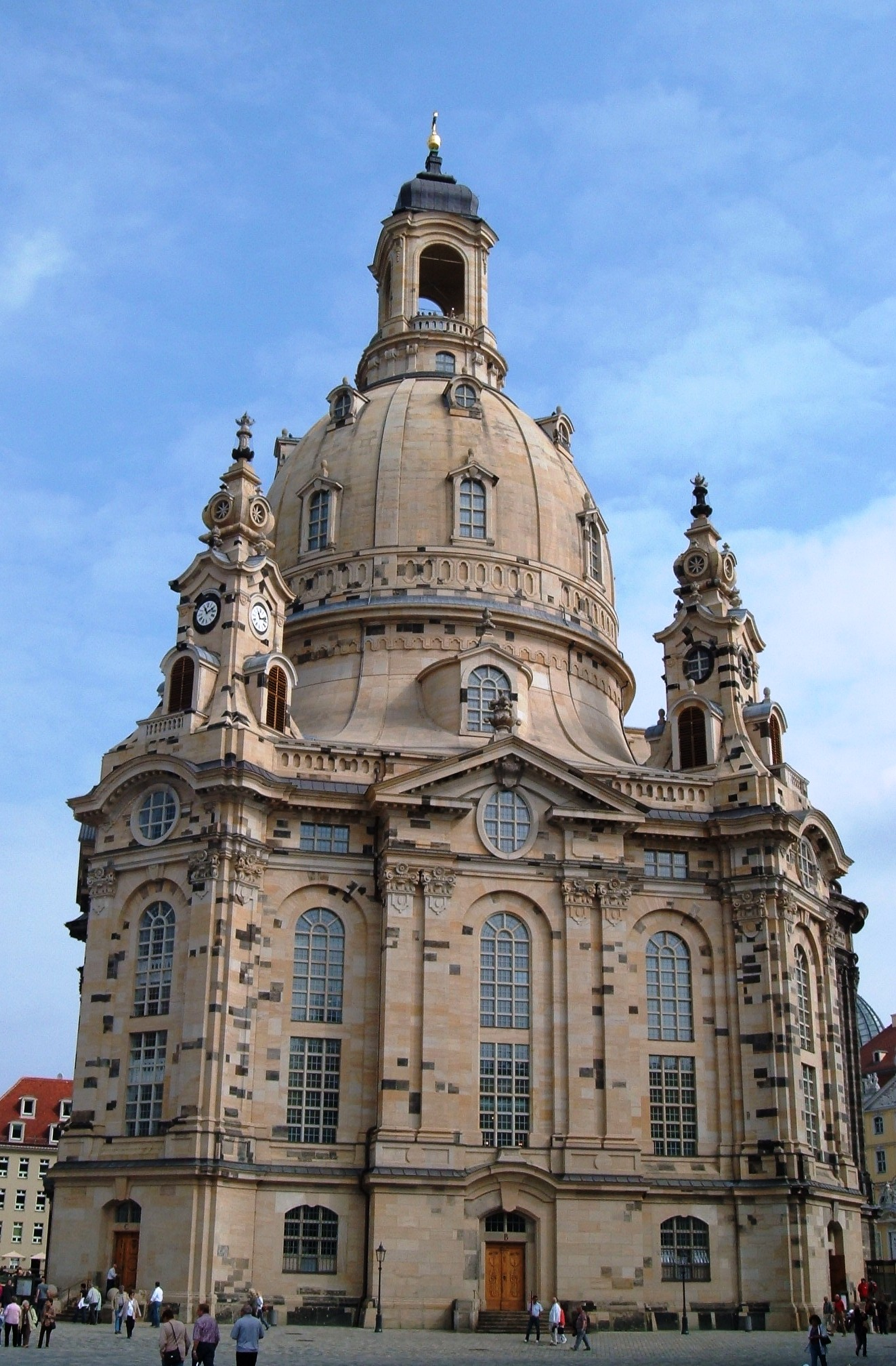 Frauenkirche (Dresda)